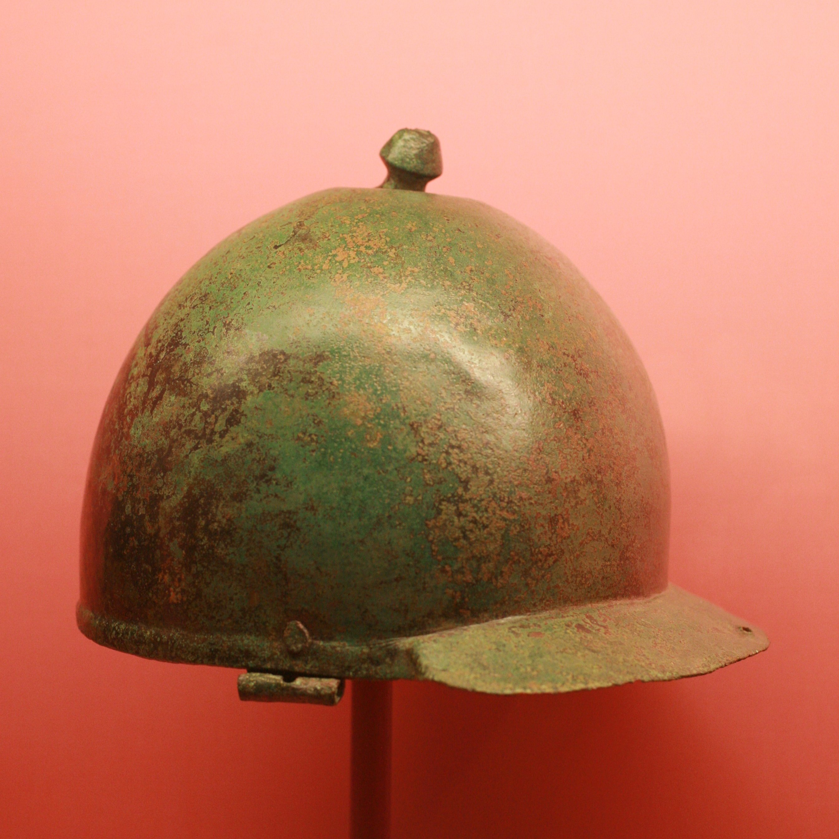 Römischer Helm vom Typ Montefortino. Museum Carnuntum